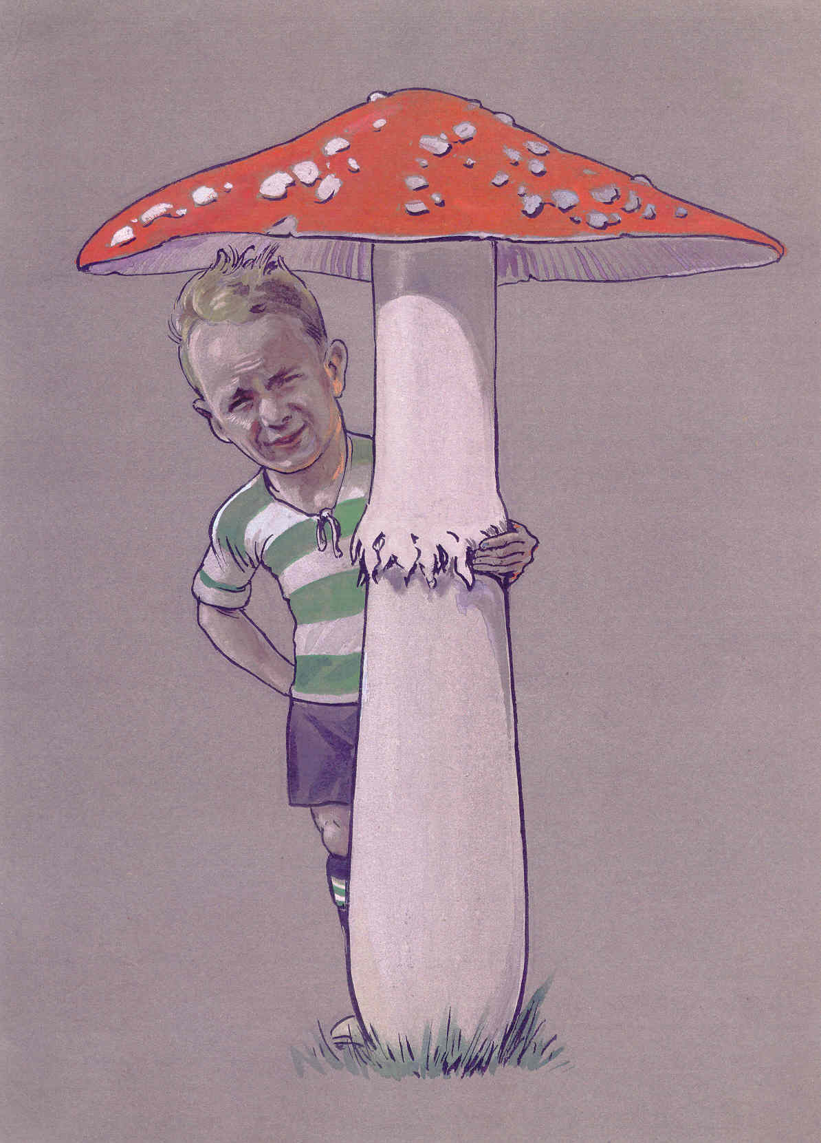 Johann Horvath, österreichischer Fußballspieler, gezeichnet von Max Leuthe (1879-1945)